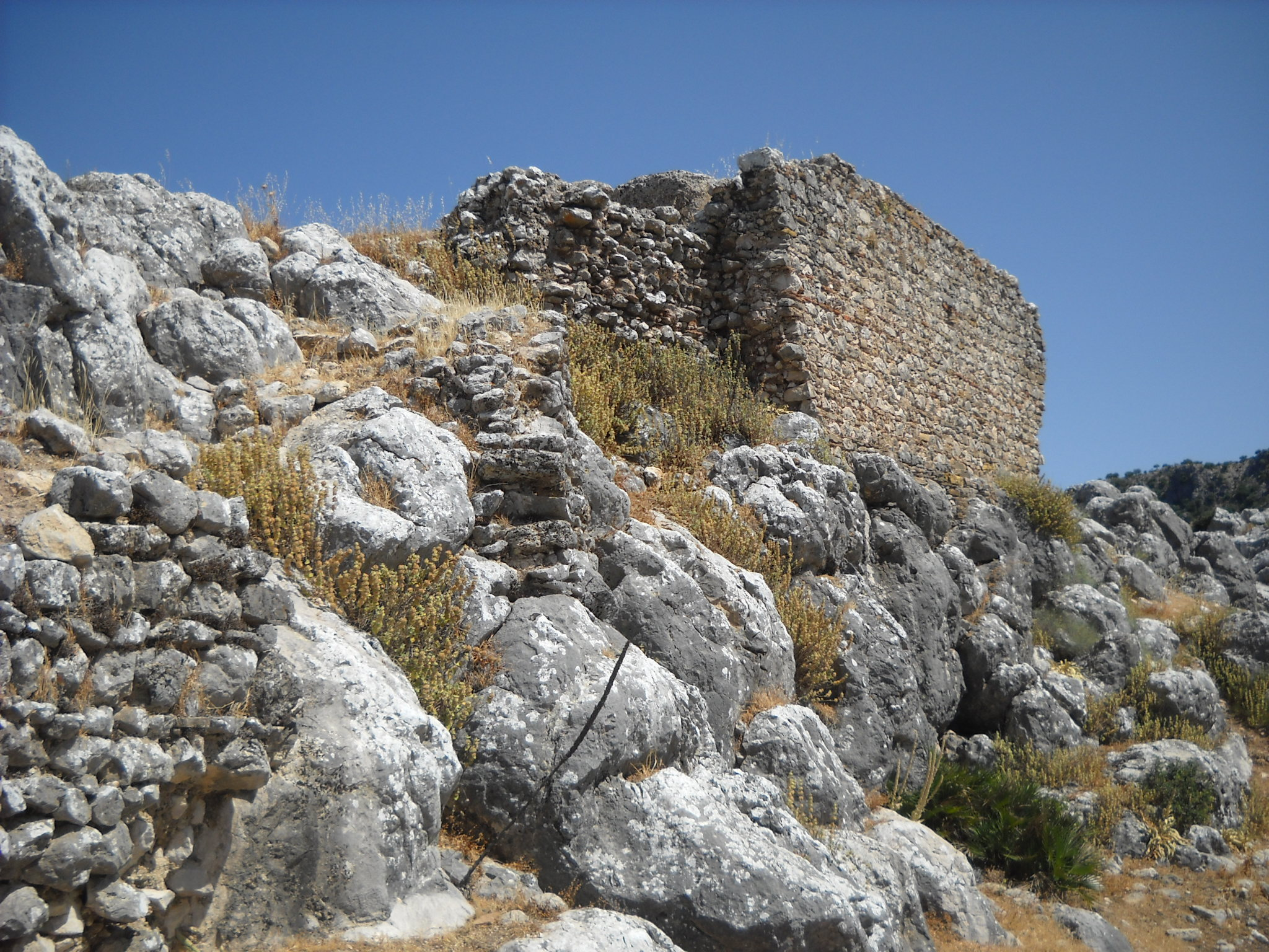 Estructura de mampostería asociada al aljibe del Castillo de Cardela o de Fátima, en el término municipal de Ubrique (Cádiz).